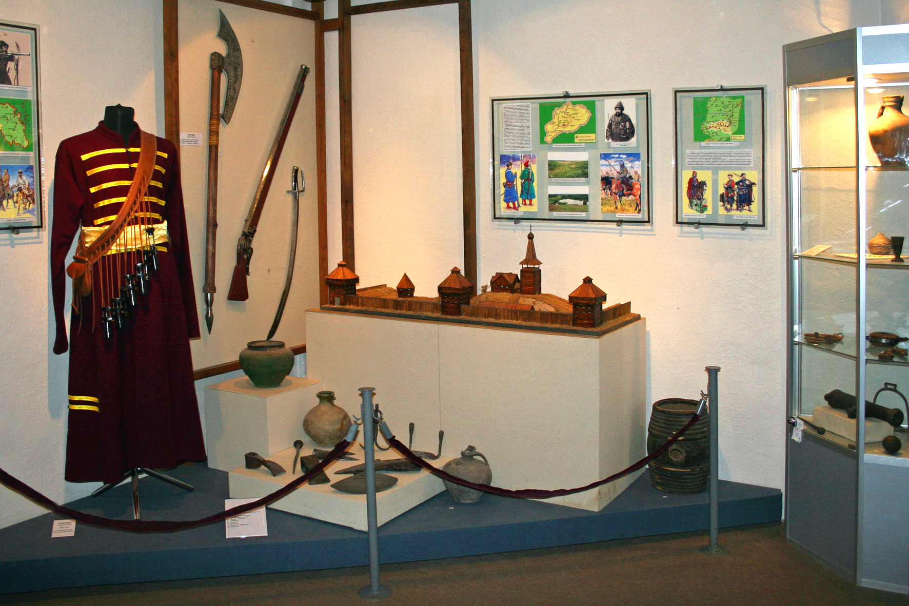 Экспозиция Шебекинского музея